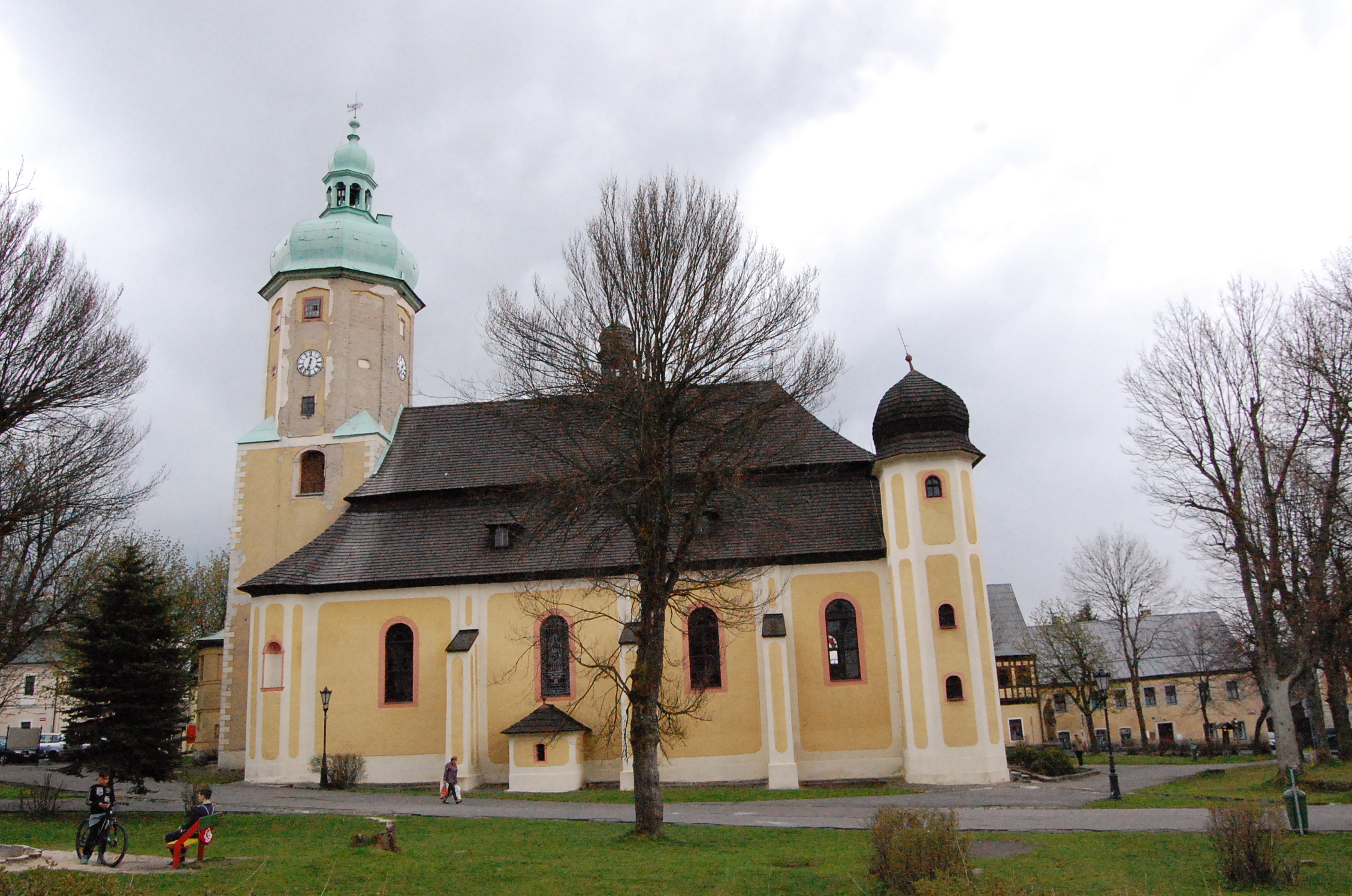 Horní Blatná, Kostel svatého Vavřince, pohled z jižní strany.